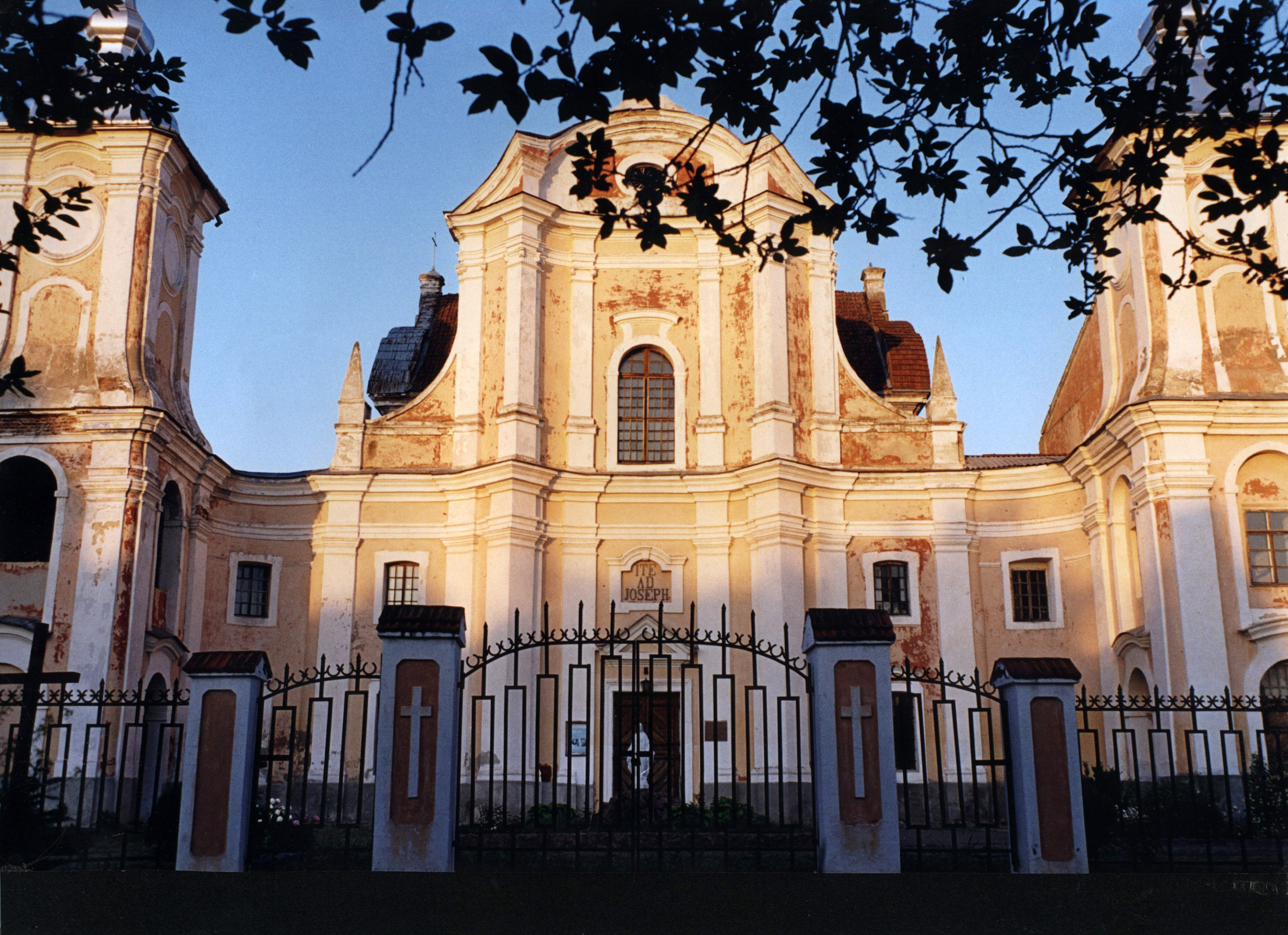 костьол св. Йосипа; Ізяслав (Заслав), Хмельницька область